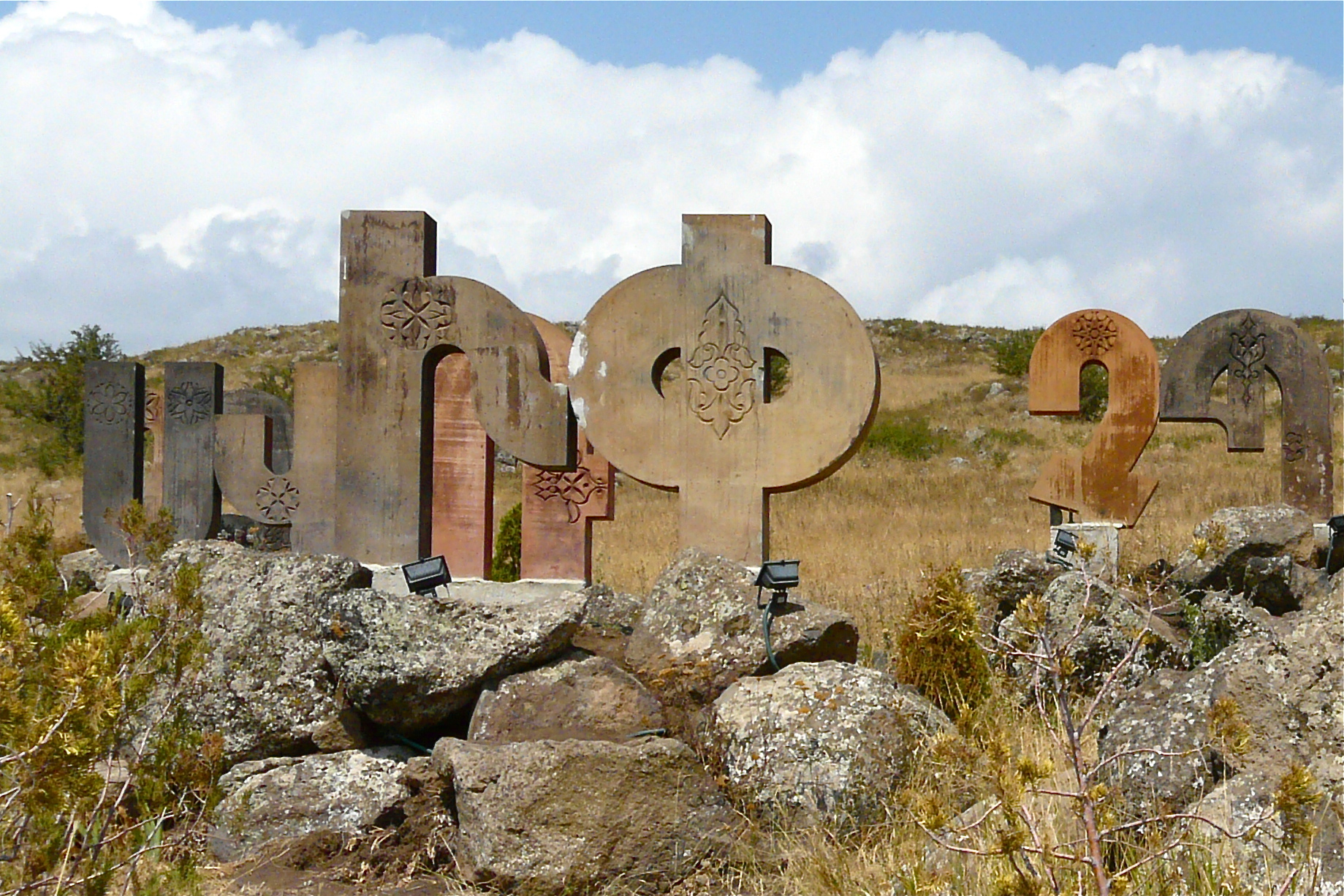 Het Armeense alfabet werd in 405 ontworpen door de Armeense geleerde en religieuze Mesrop Masjtots. Beide in Armeni� gesproken talen (Oost-Armeens en West-Armeens) gebruiken het Armeense alfabet. Het alfabet bestond oorspronkelijk uit 36 letters. De volgorde van de letters had een religieuze symboliek; het Armeense alfabet begon met "?" A en eindigde met "?" Q, dit verwees naar God (???????) en naar Christus (???????). Later werden er de letters "?" (j)ev, "?" o en "?" f bij toegevoegd. uit: lees meer